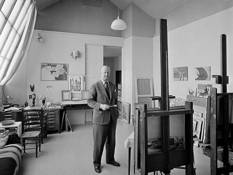 Södermalmstorg 4. Kurt Ljungstedt i sin ateljé. Kurt Ljungstedt var vän till Evert Taube som övertog ateljén efter honom.